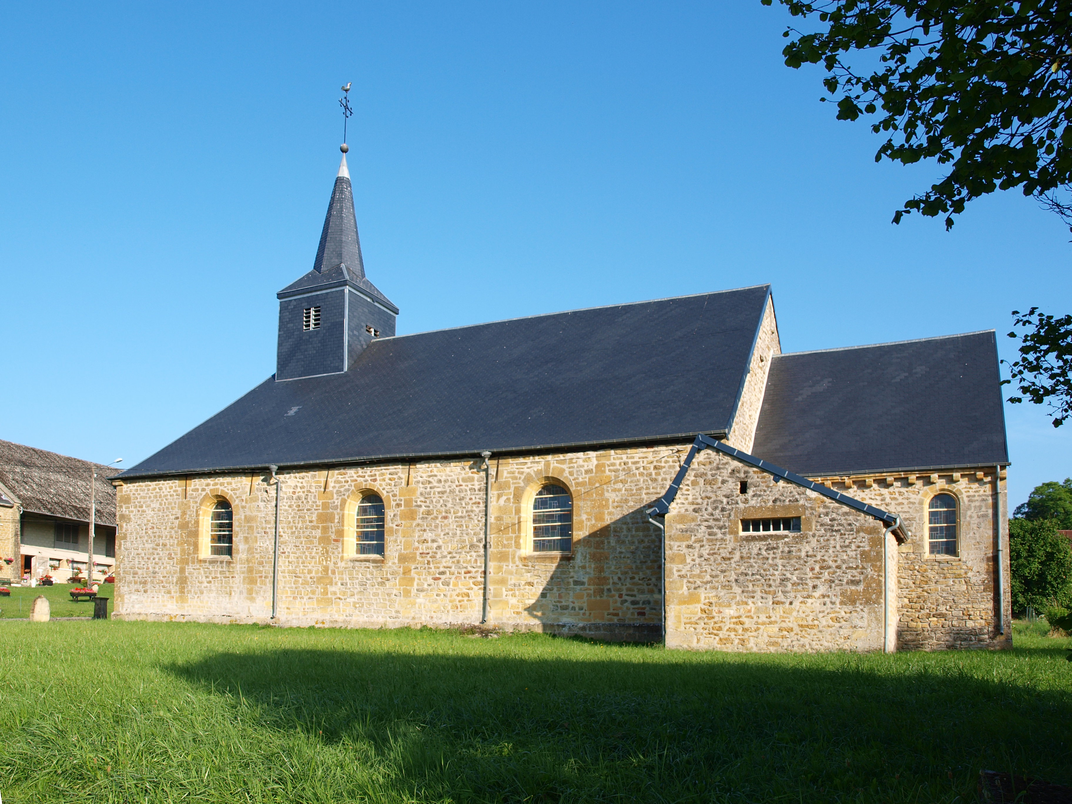 Les Grandes-Armoises (Ardennes, France) ; église.